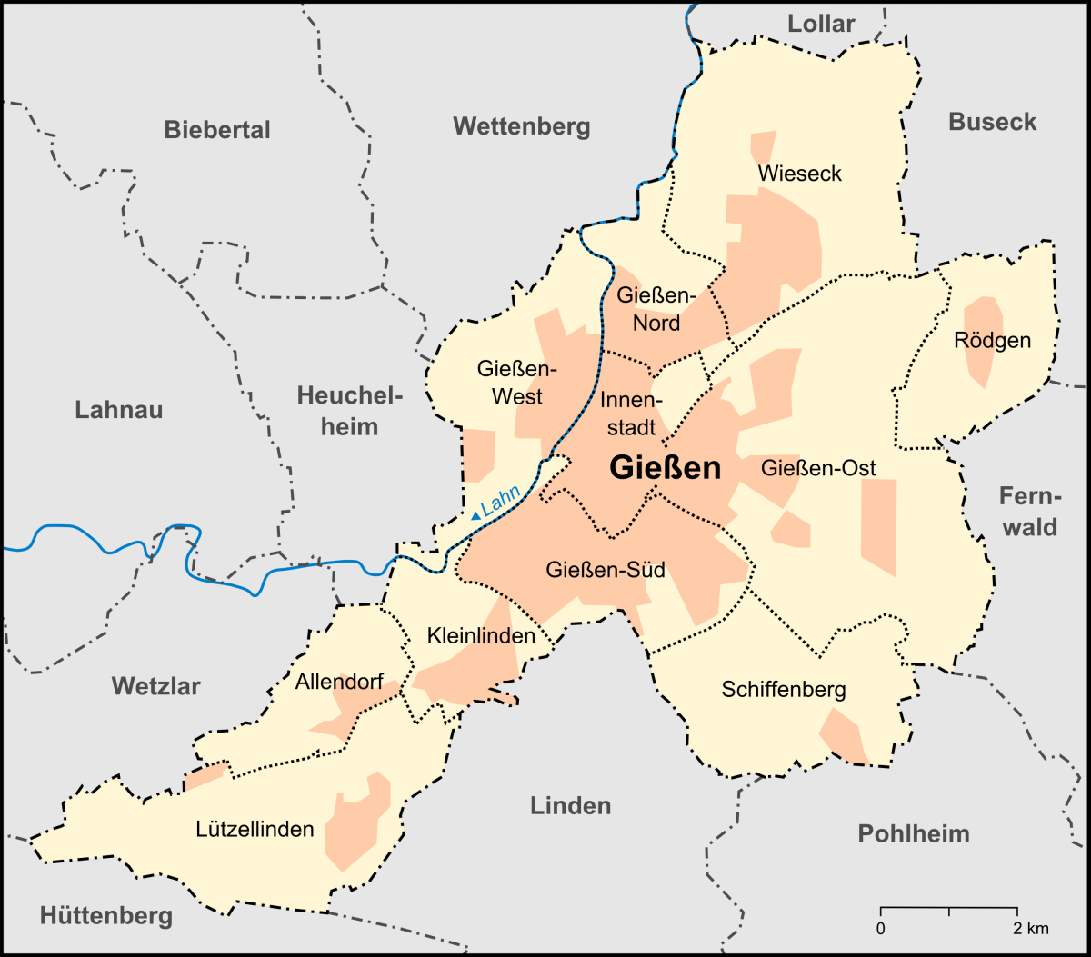 Karte der statistischen Stadtteile und der Umlandgemeinden von Gießen